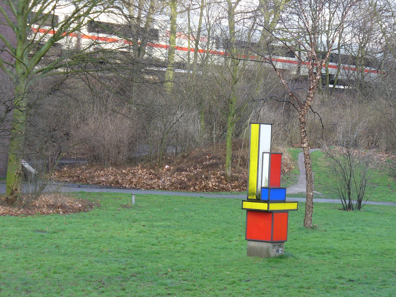 Sculpture by Walter Dexel in der Grünalage zwischen Esplanade, Dammtordamm und der Verbindungsbahn Hamburg-Neustadt/Germany